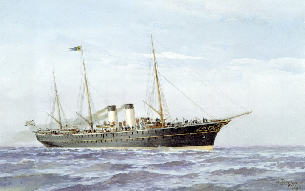 Imperial yacht "Polar Star"